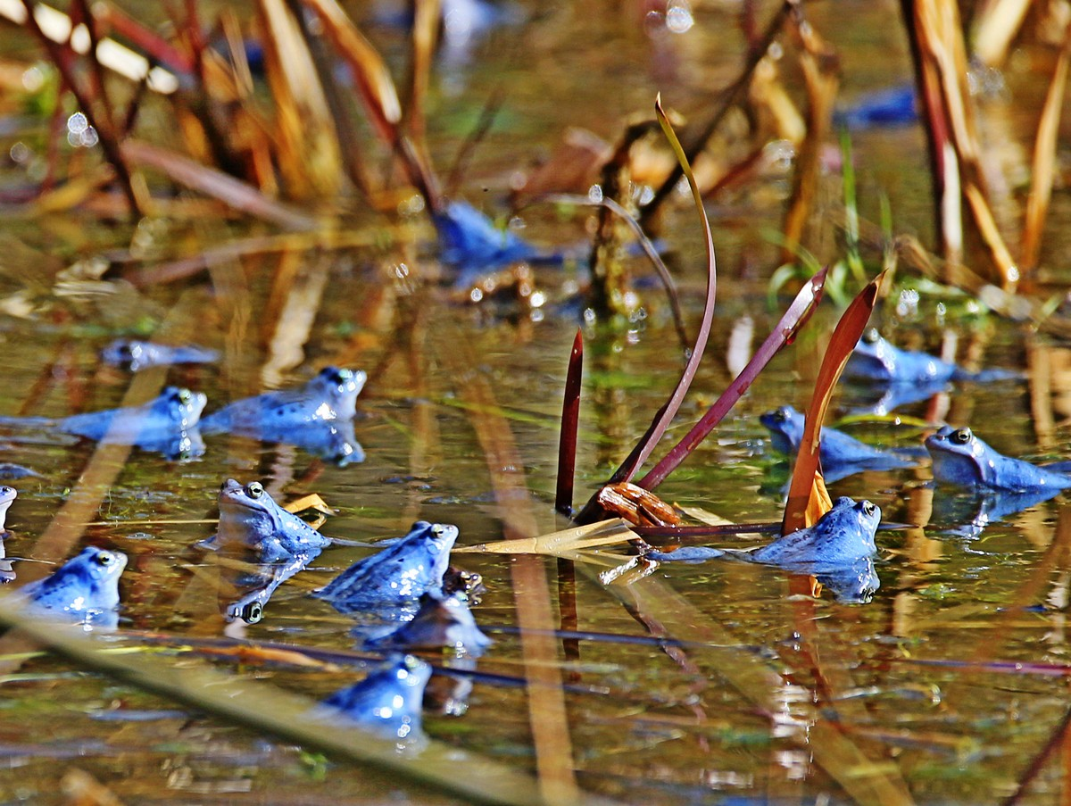 Moorfrösche im Ostteil des Plauer Stadtwaldes